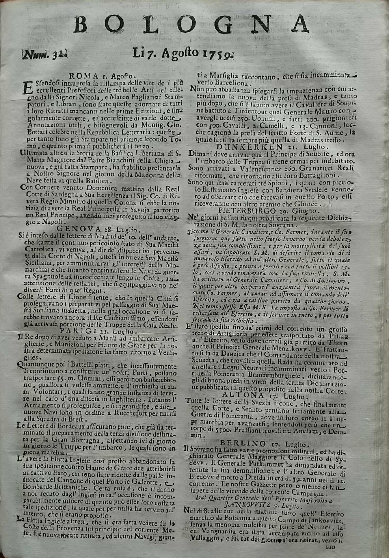 Gazzetta "Bologna" numero del 7 Agosto 1759